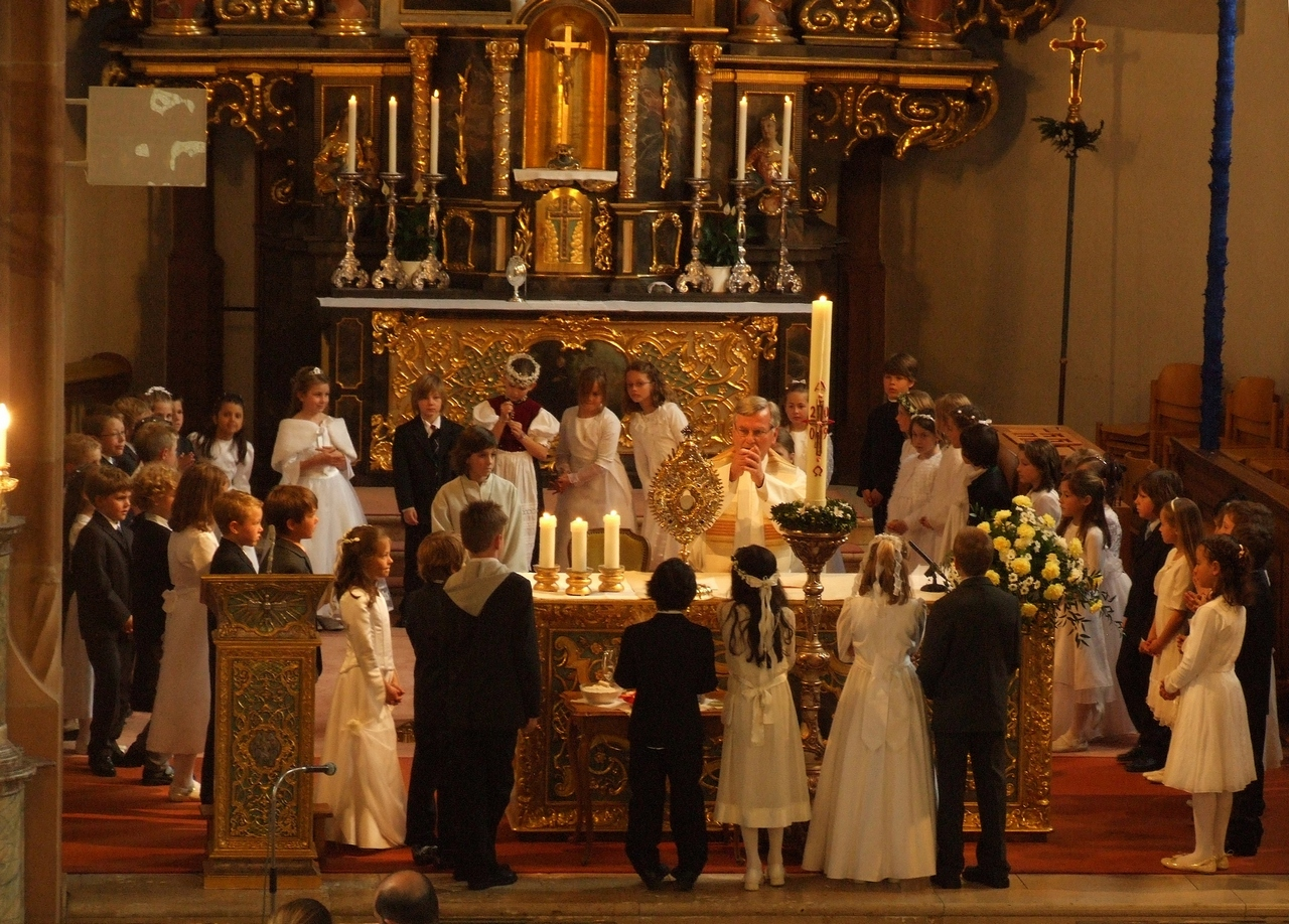 Erstkommunion St. Gallus Kirchzarten